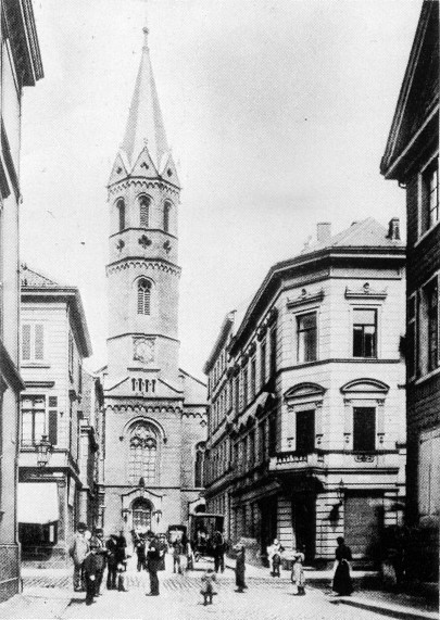 Neue reformierte Kirche Wuppertal, Ansicht von Süden, Photo um 1900